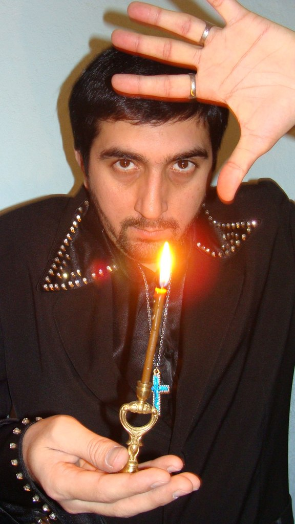 Павсекакий Богданов во время "магического" сеанса